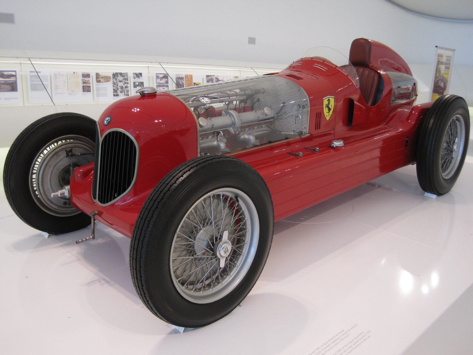 Automobiles in Enzo Ferrari Museum in Modène - Alfa Roméo Bimoteur 2 x 8 cylindres - 1935